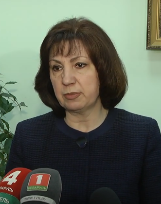 Глава Администрации Президента Республики Беларусь Наталья Кочанова во время визита в Гомель